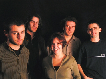 Emsaverien